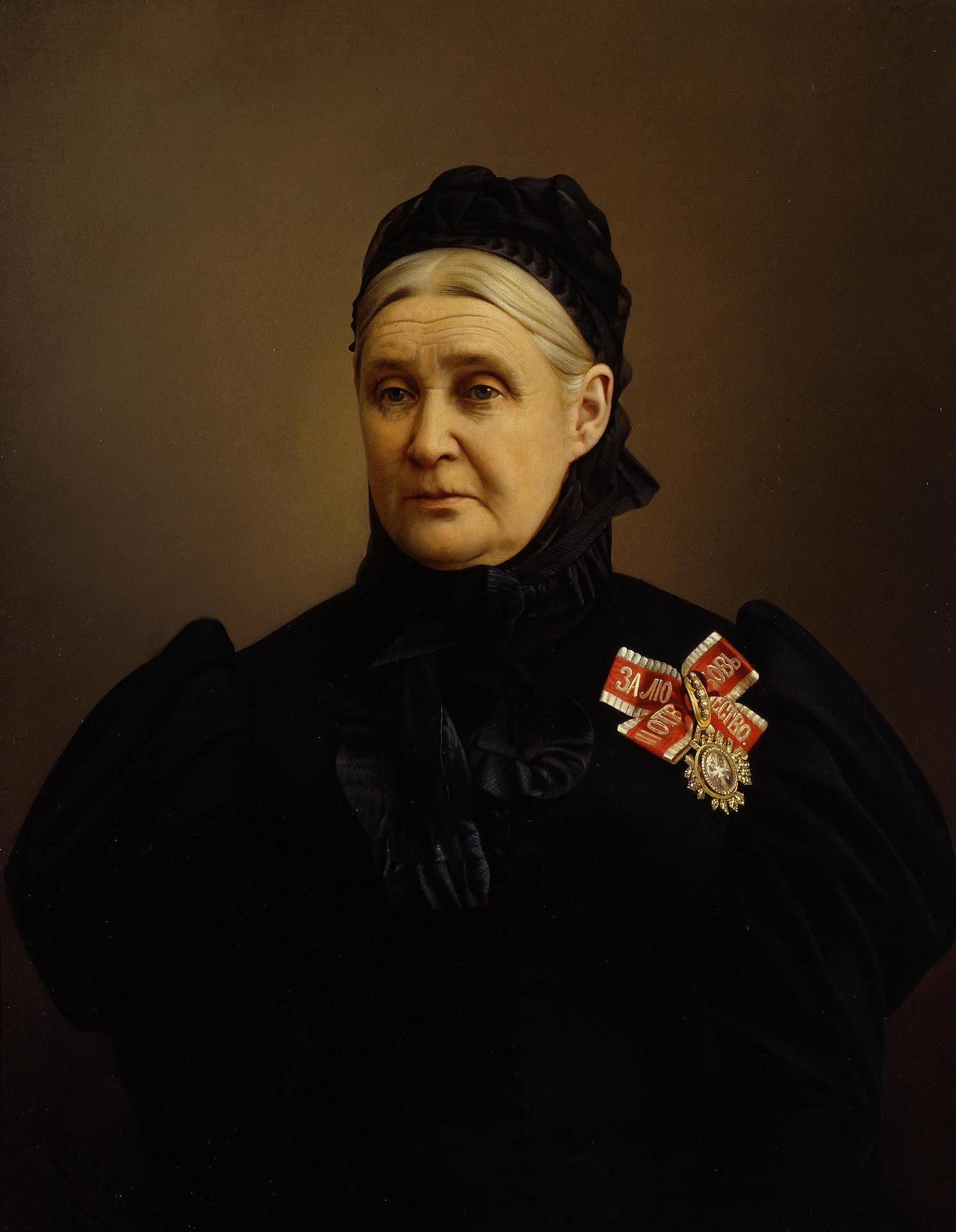 Portrait of Maria Novosiltseva (circa 1830 date QS:P,+1830-00-00T00:00:00Z/9,P1480,Q5727902—1910)